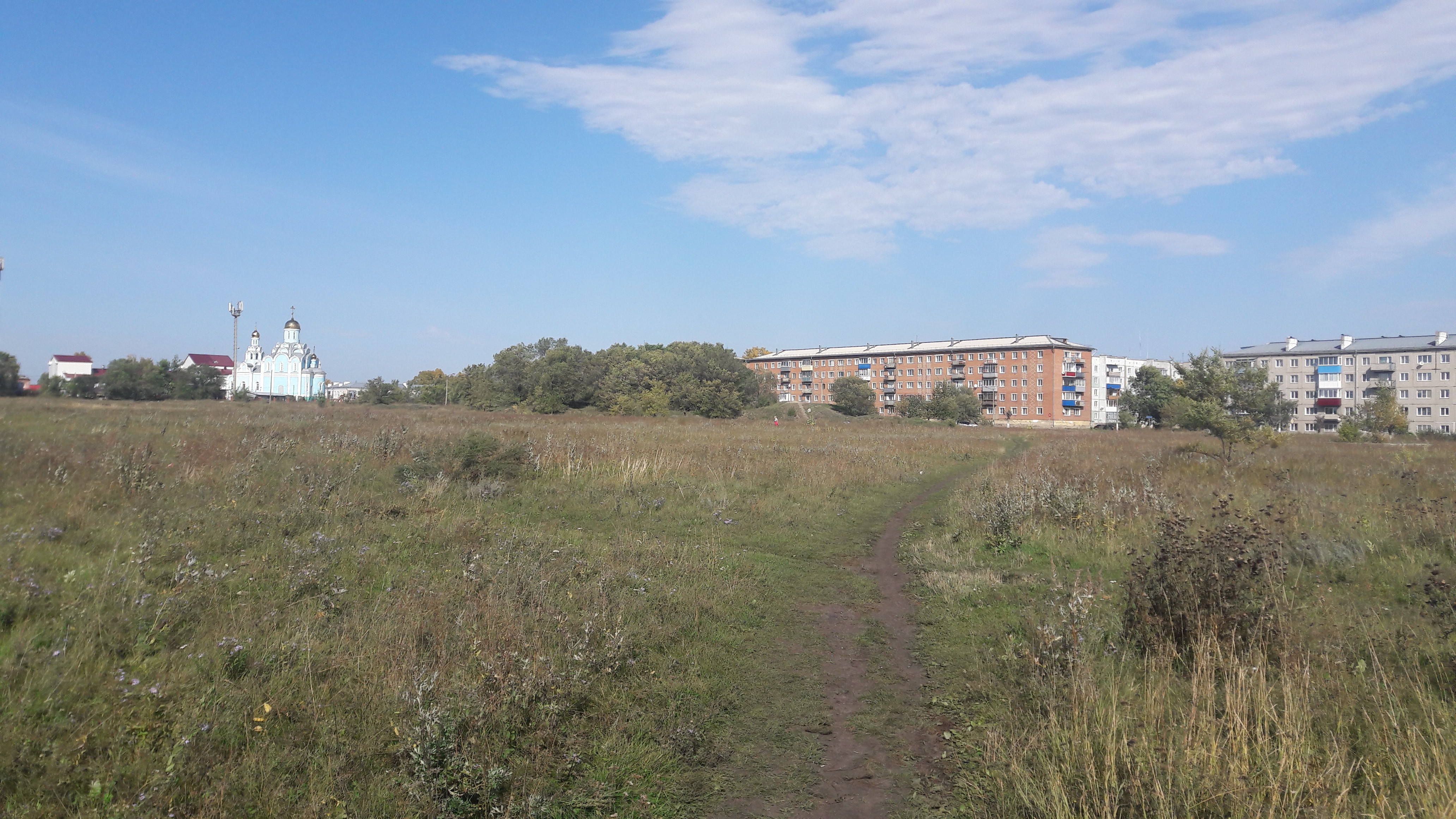 Поле в пгт Новый Городок